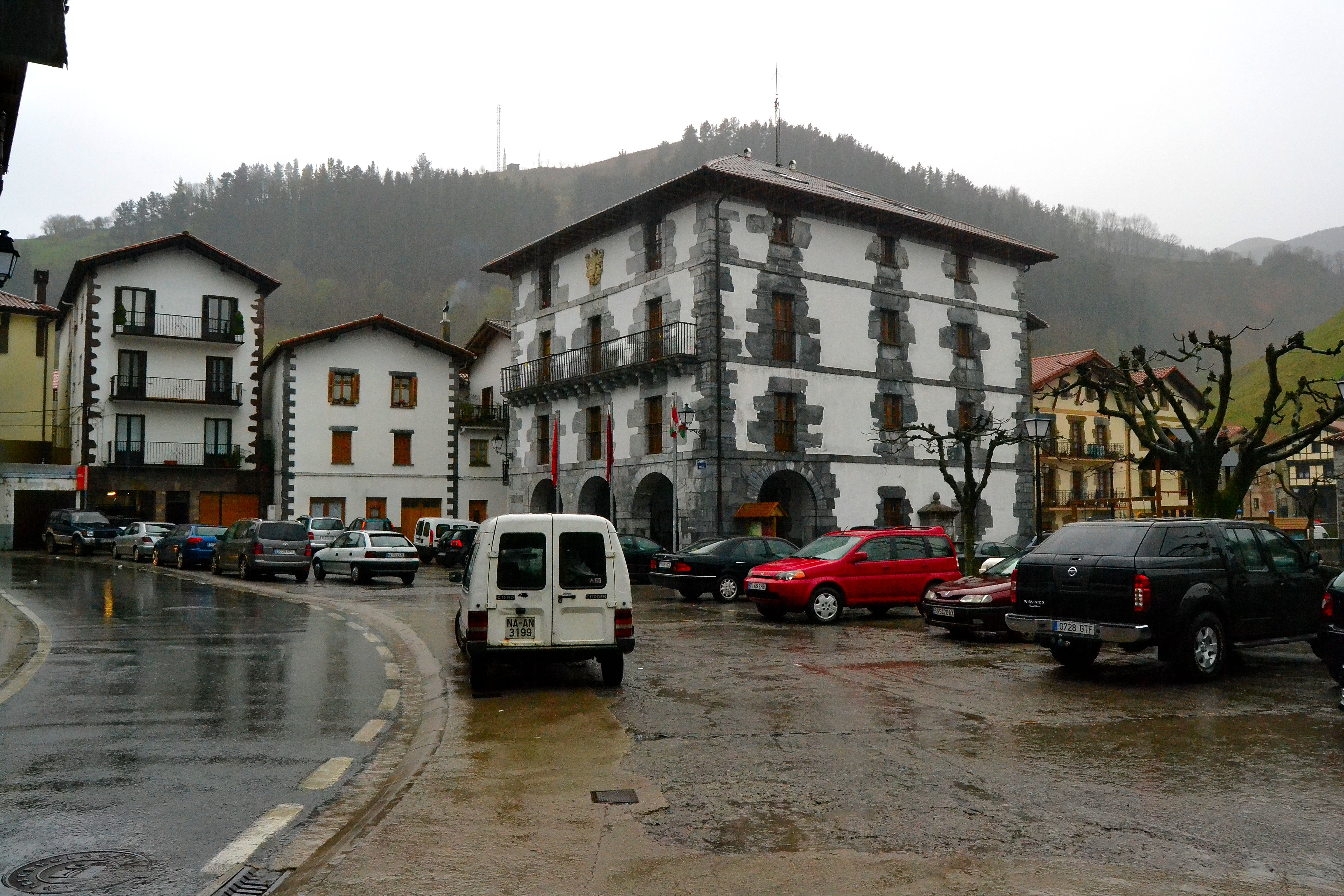 Goizuetako udaletxea. Nafarroa, Euskal Herria. Goizueta's Town Hall. Navarre, Basque Country.